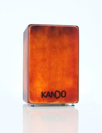 קחון פלמקו